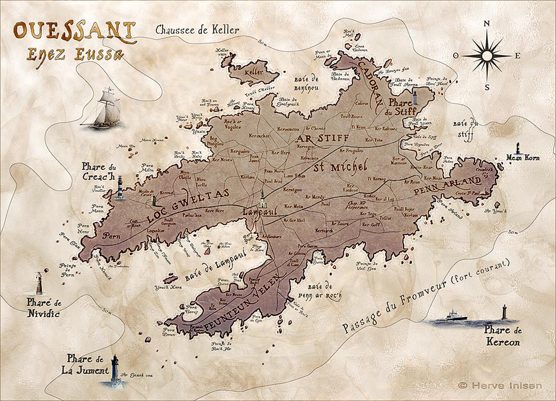 Carte de l'Île d'Ouessant